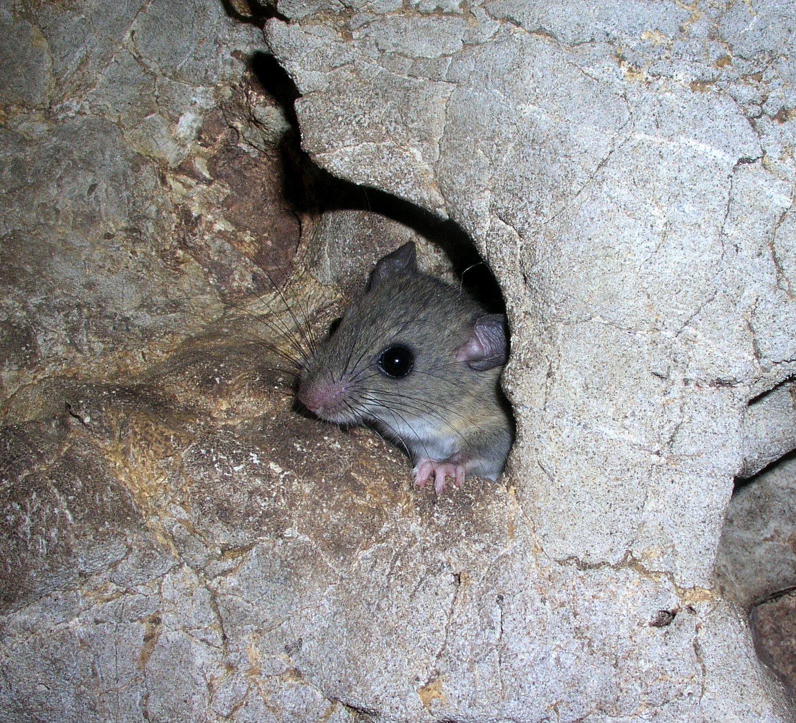 Raton de la resurgencia de la bocatoma de Tuemal (Omia, Rodriguez de Mendoza, Amazonas, Peru).